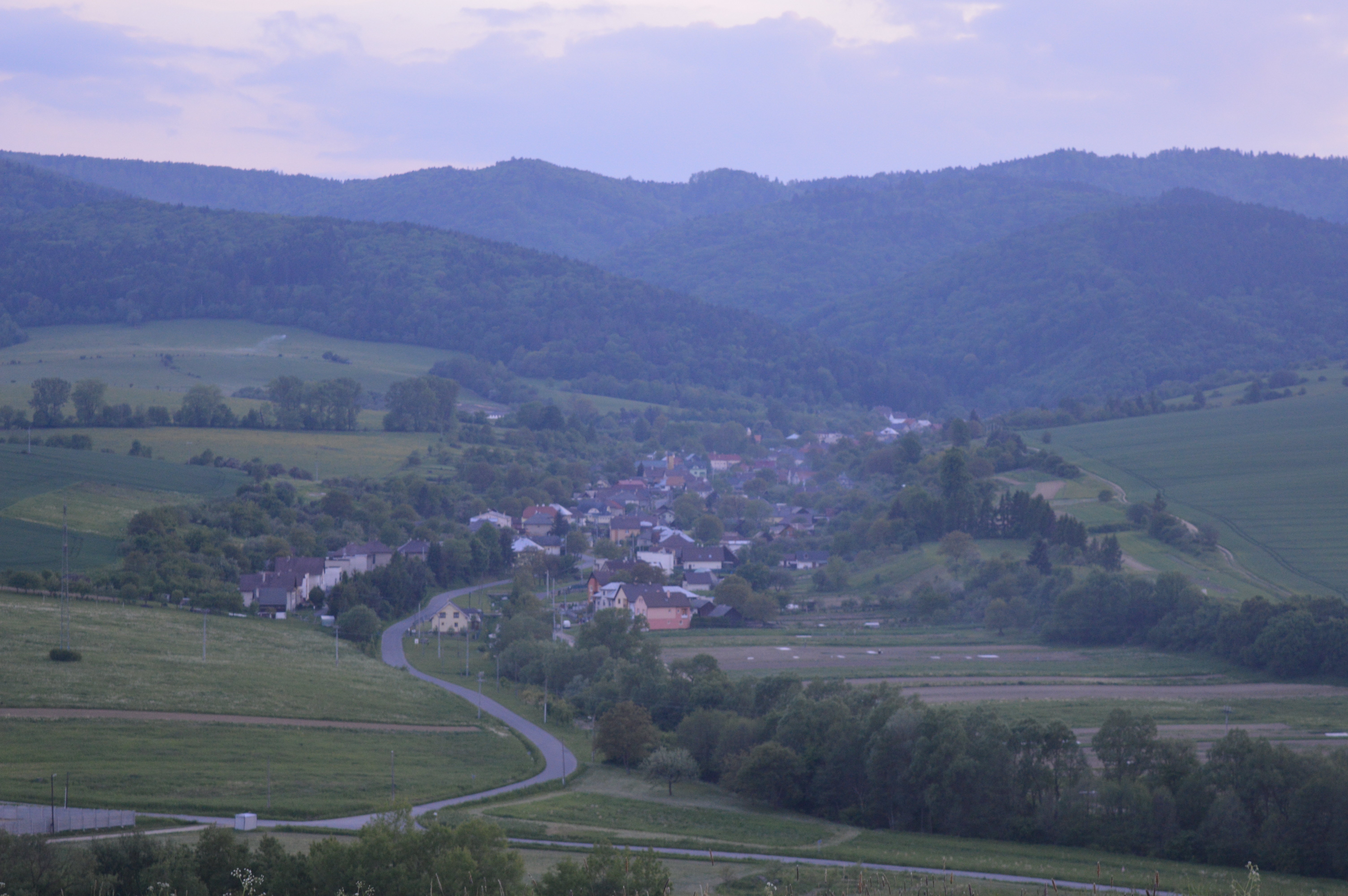 Večerný pohľad na dedinu Šiba.